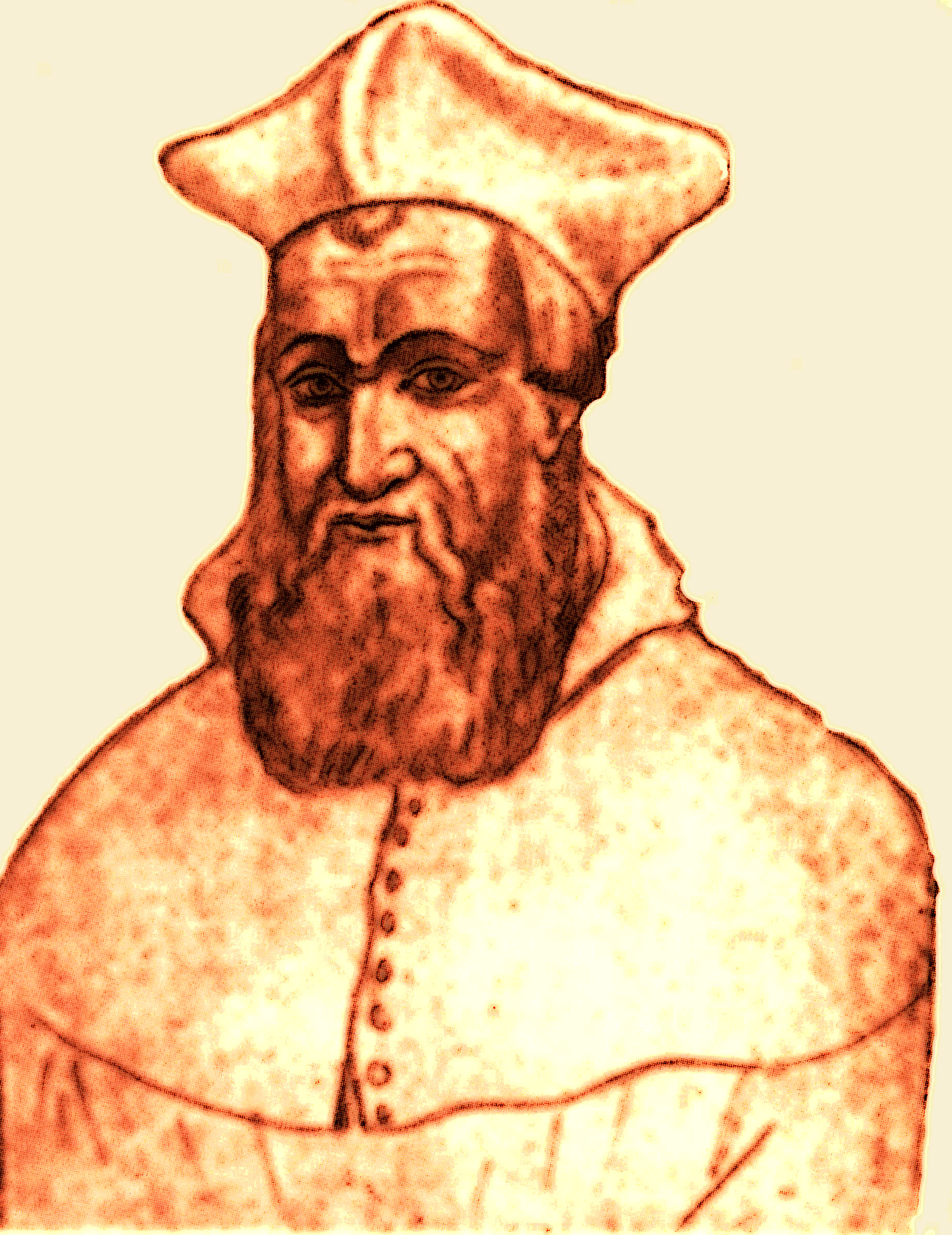 Cardinal Jacques Sadolet, evêque de Carpentras, sanguine du Recueil d'Arras par Jacques Le Boucq